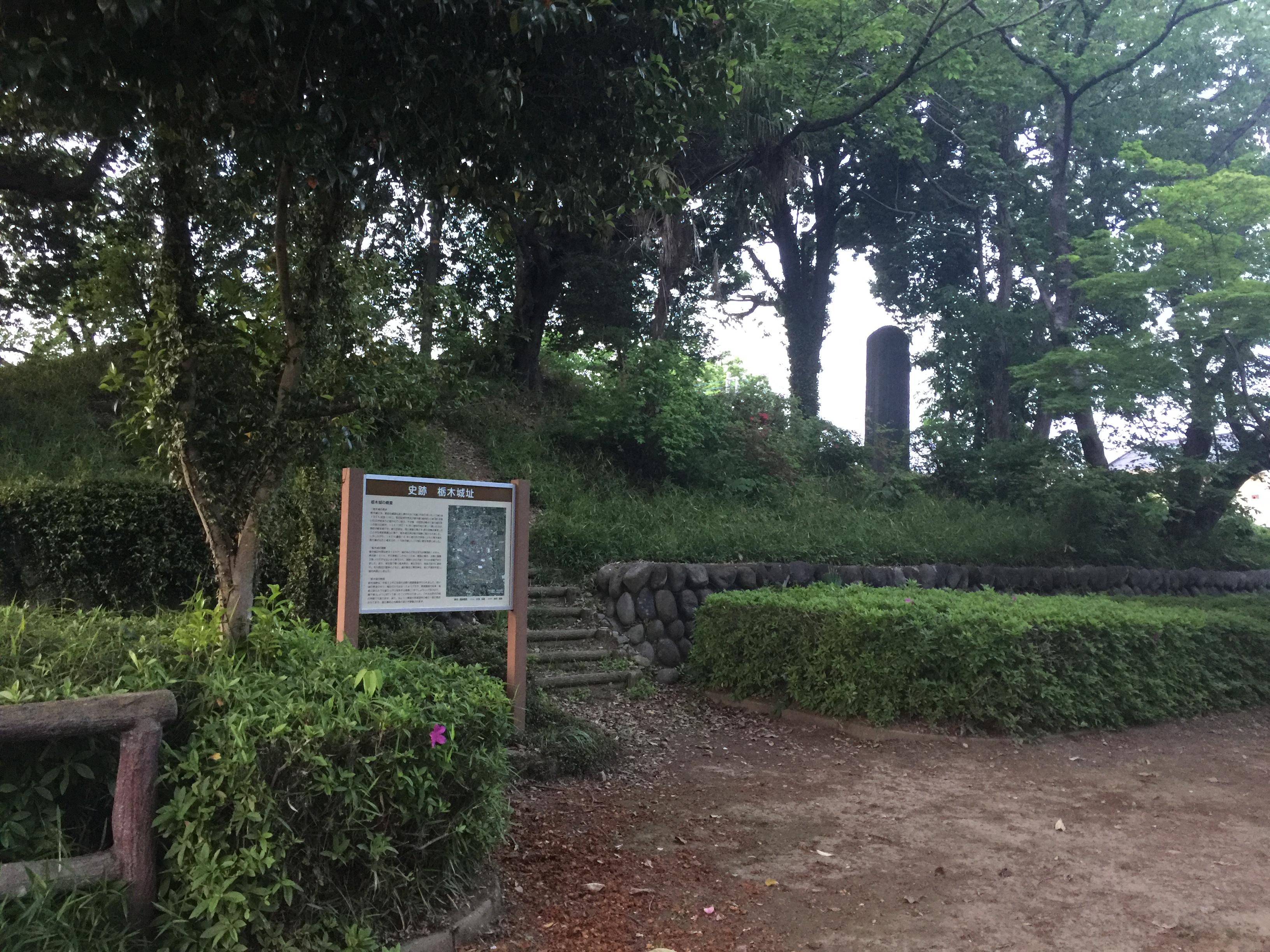 栃木県栃木市城内町にある、栃木城址公園。